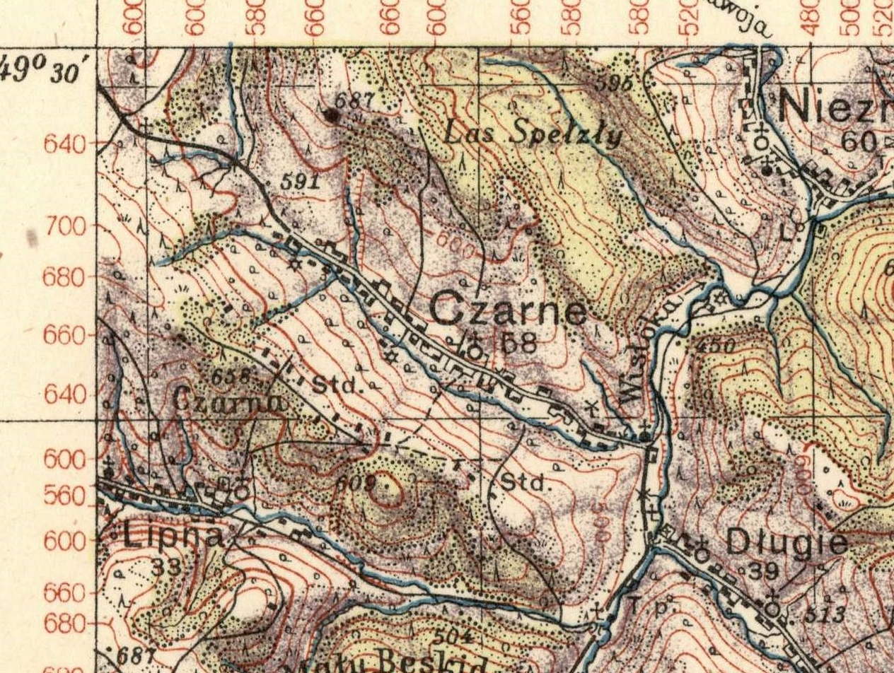 Fragment mapy Wojskowego Instytutu Geograficznego z 1938 roku, skala 1:100 000, wieś Czarne w Beskidzie Niskim